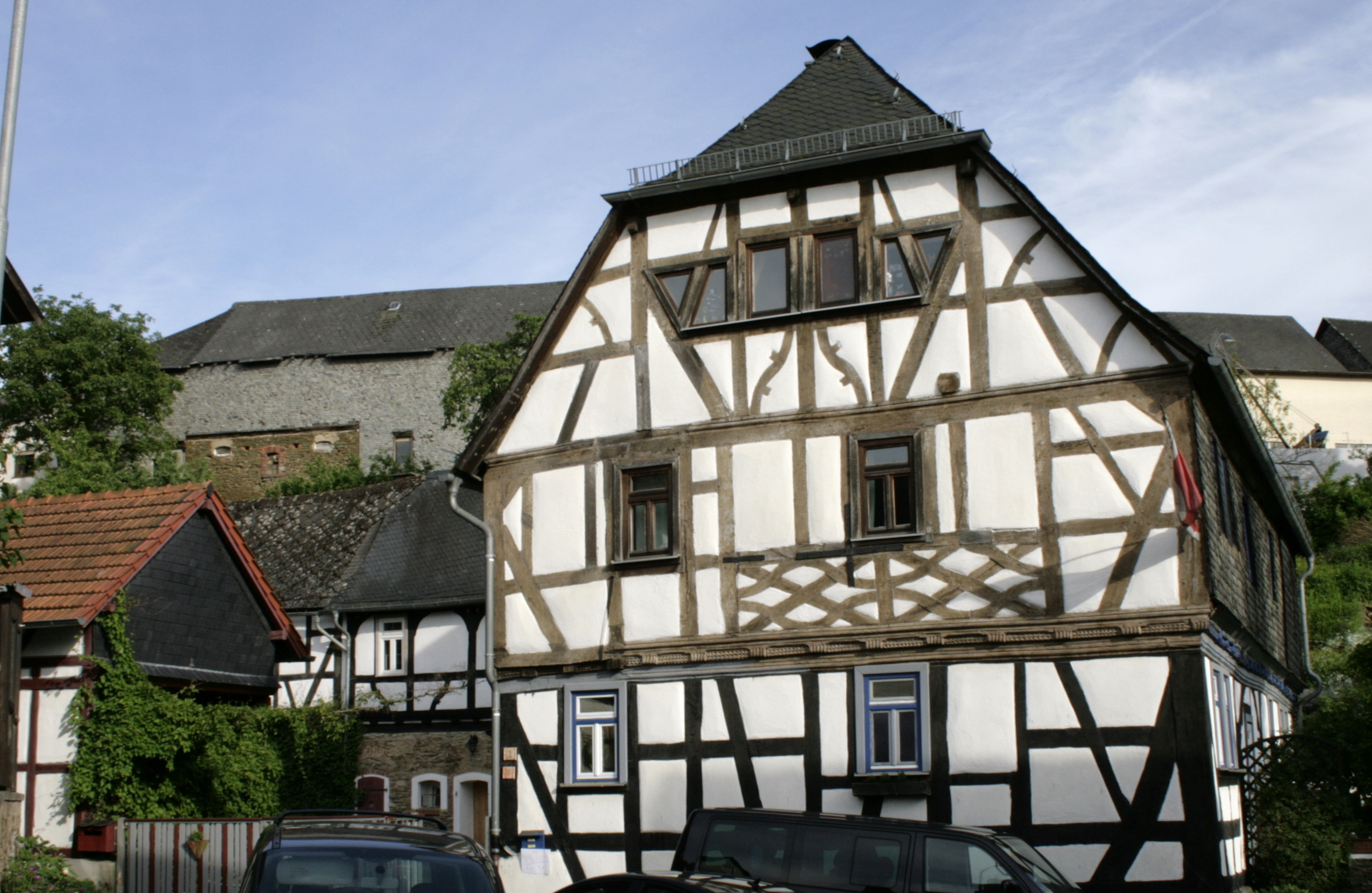 Hof Colonius in Seelbach, Deutschland